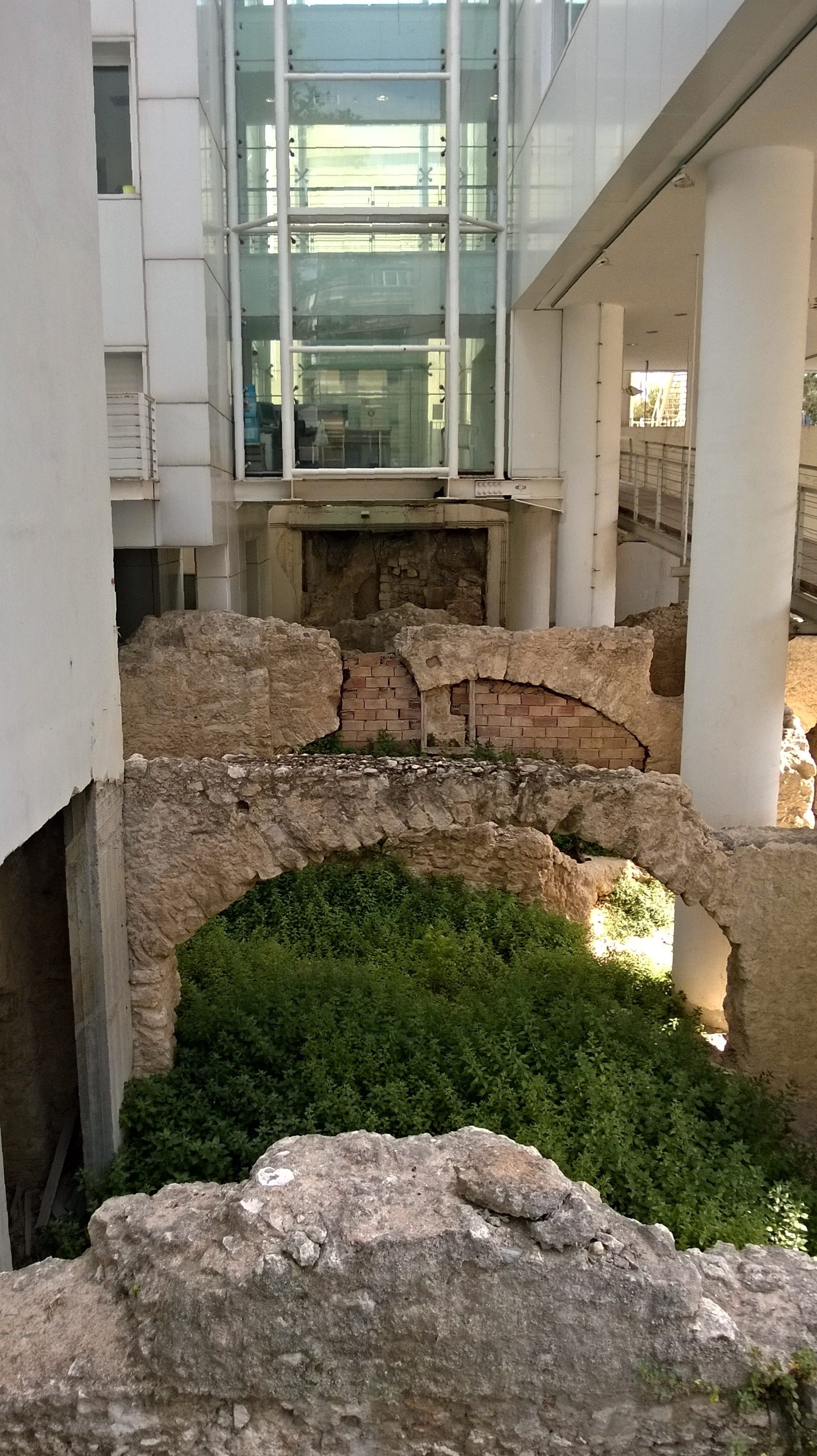 Iraklion